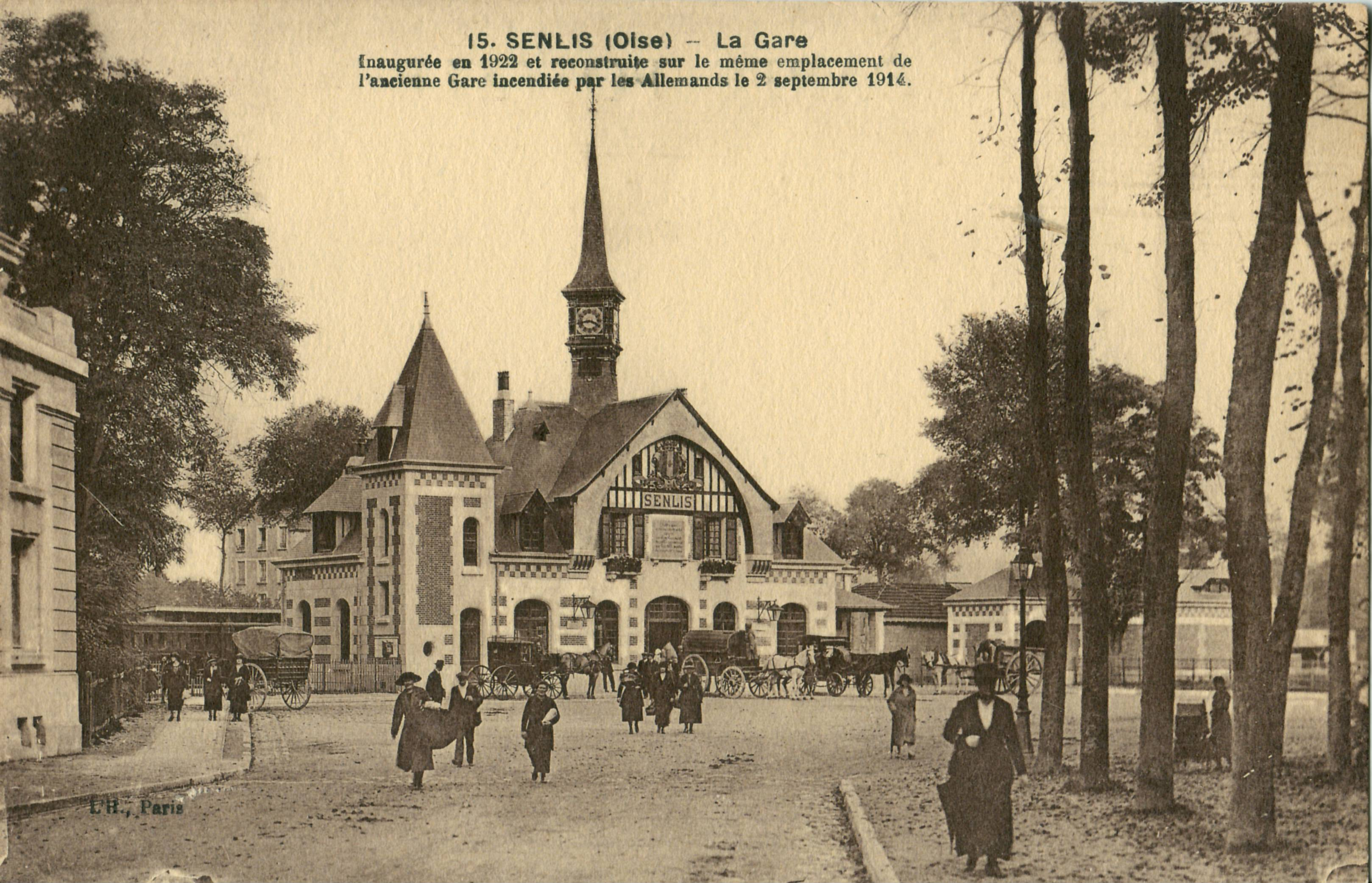 Carte postale ancienne éditée par L'H à Paris, n°15 SENLIS - La Gare "Inaugurée en 1922 et reconstruite sur le même emplacement de l'ancienne gare incendiée par les Allemands le 2 septembre 1914"